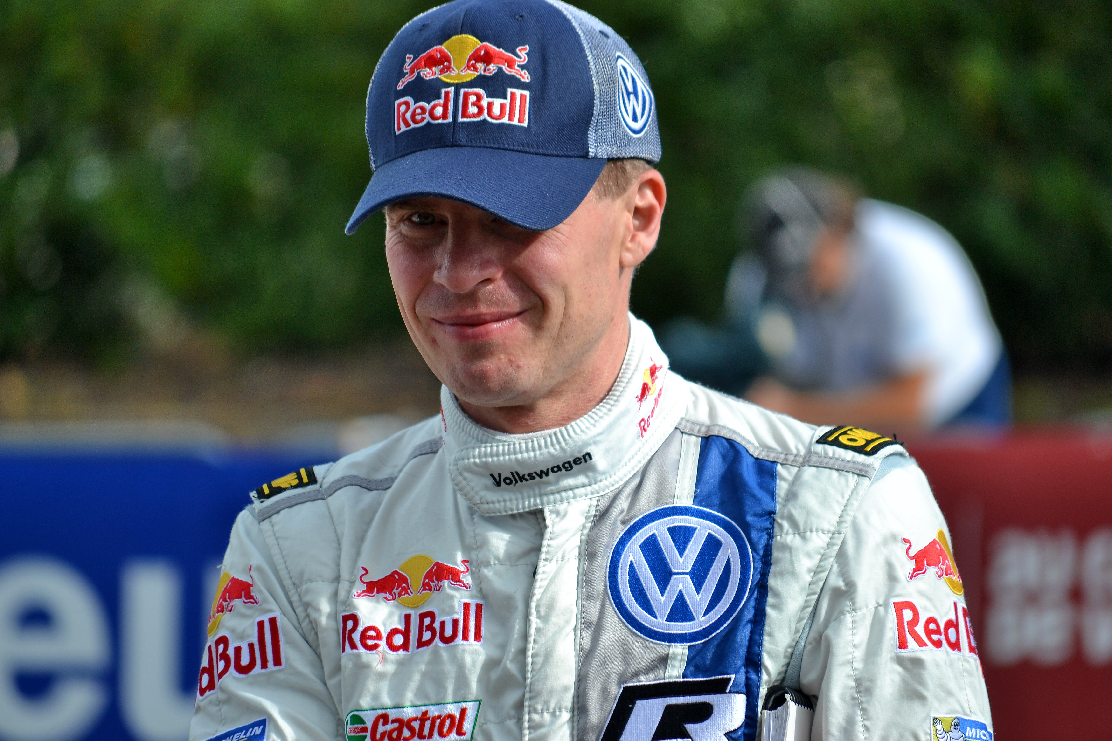 Miikka Anttila au parc d'assistance de Colmar durant le Rallye de France-Alsace 2013.